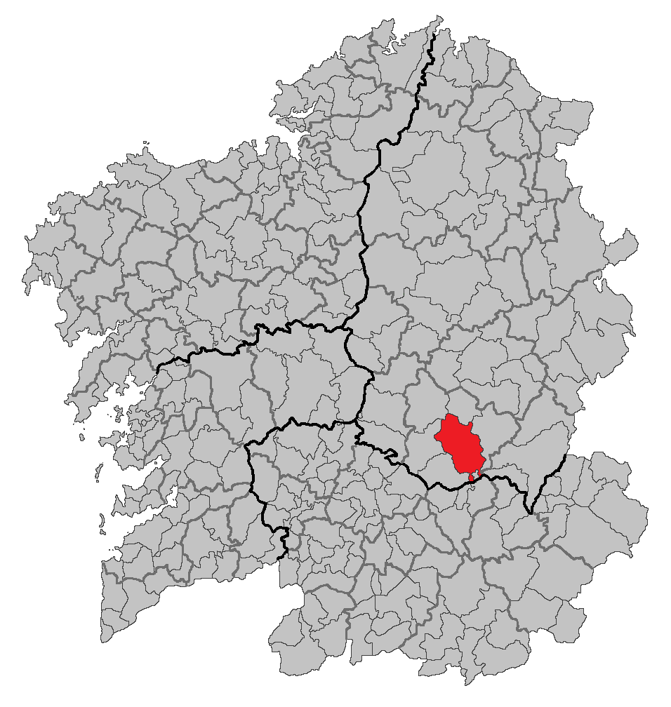 Mapa coa localización do concello de Monforte de Lemos.